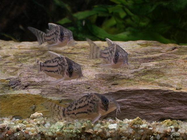 schwartzi